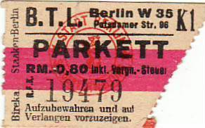 Berlin-Tiergarten BTL-Lichtspiele Kinokarte ca. 1938 - 1943